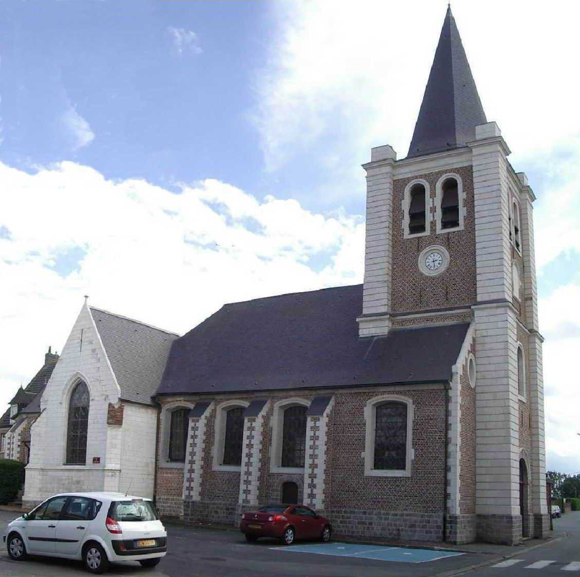 Eglise St Nicolas à Allennes-les-Marais